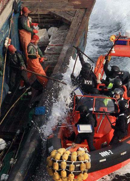 中韩渔业冲突